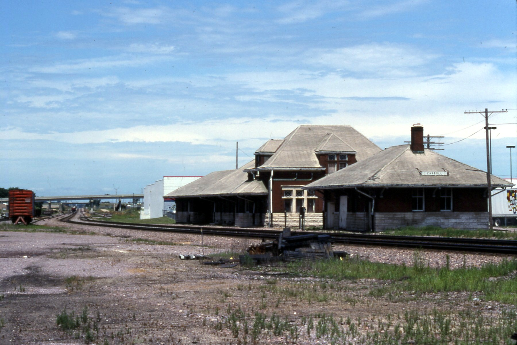 19950722 18 UP Carroll, IA